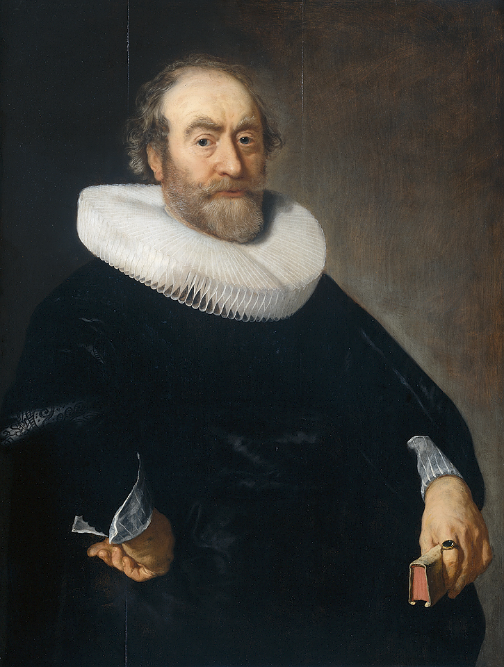 Pendant of File:Bartholomeus van der Helst 003.jpg